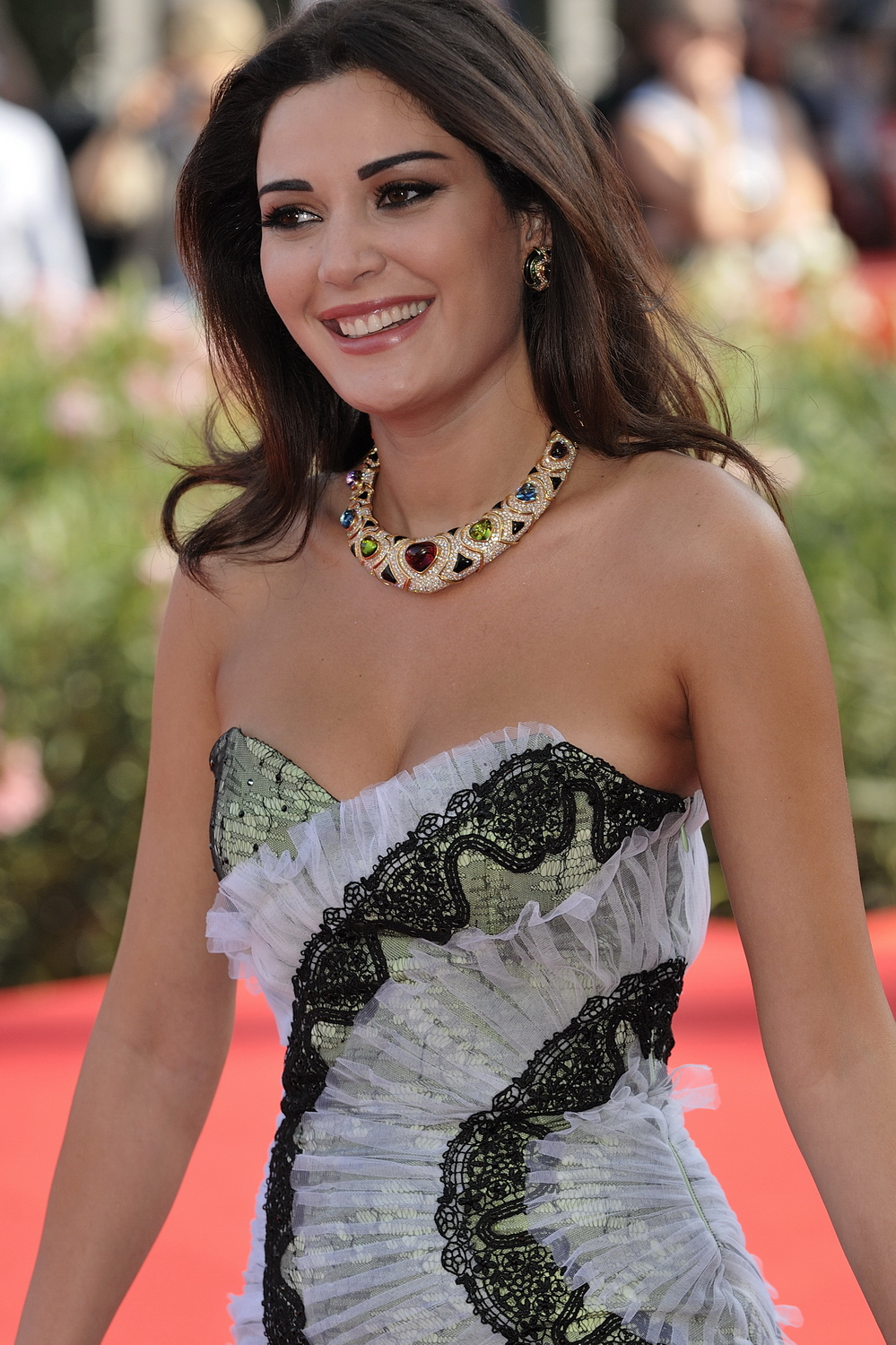 66ème Festival du Cinéma de Venise (Mostra), 9ème jour (10/09/2009) Tapis rouge avec Omar Sharif et Cyrine AbdelNour pour le film The Traveller de Ahmed Maher